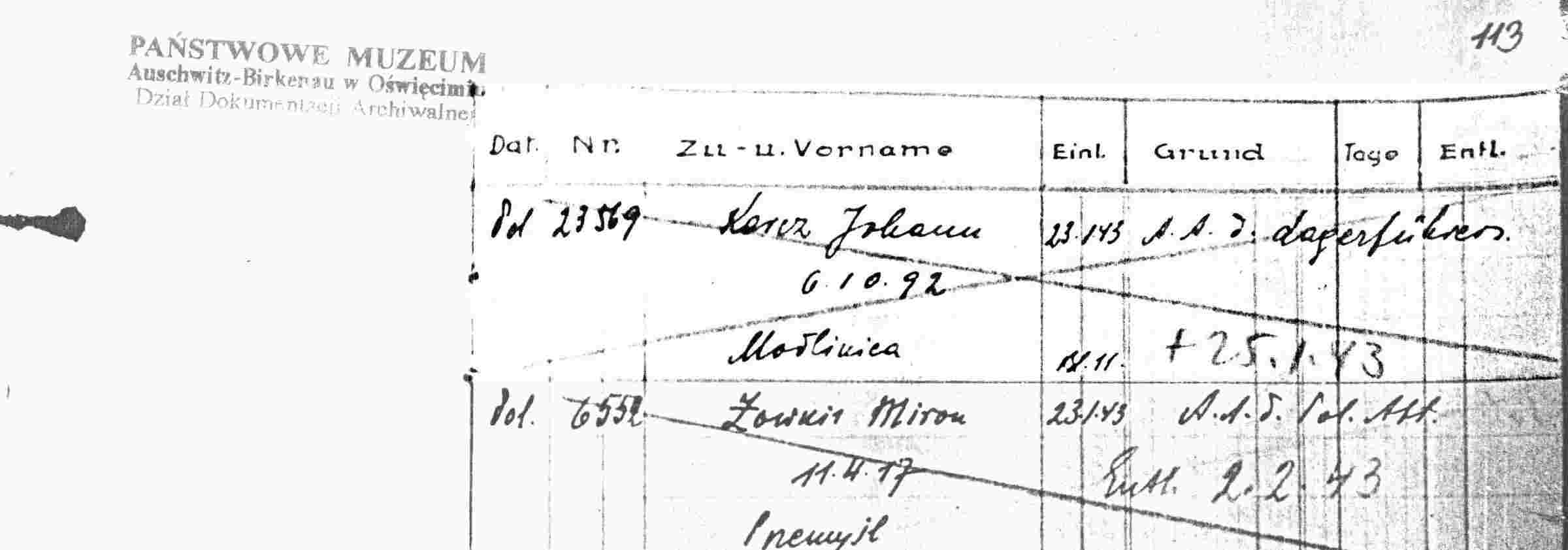 Wycinek z Książki Bunkra Bloku Śmierci będącej w zasobach Archiwum Państwowego Muzeum Auschwitz - Birkenau w Oświęcimiu